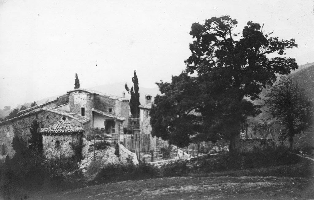 Parroquial de Sant Andreu de Porreres. Cèsar August Torras i Ferreri (Entre 1890 i 1923) This is a a photo of a natural area in Catalonia, Spain, with id: ES510085